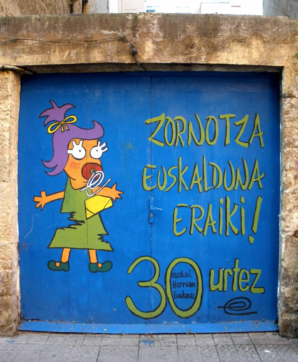 Mural en Amorebieta-Etxano (Vizcaya)